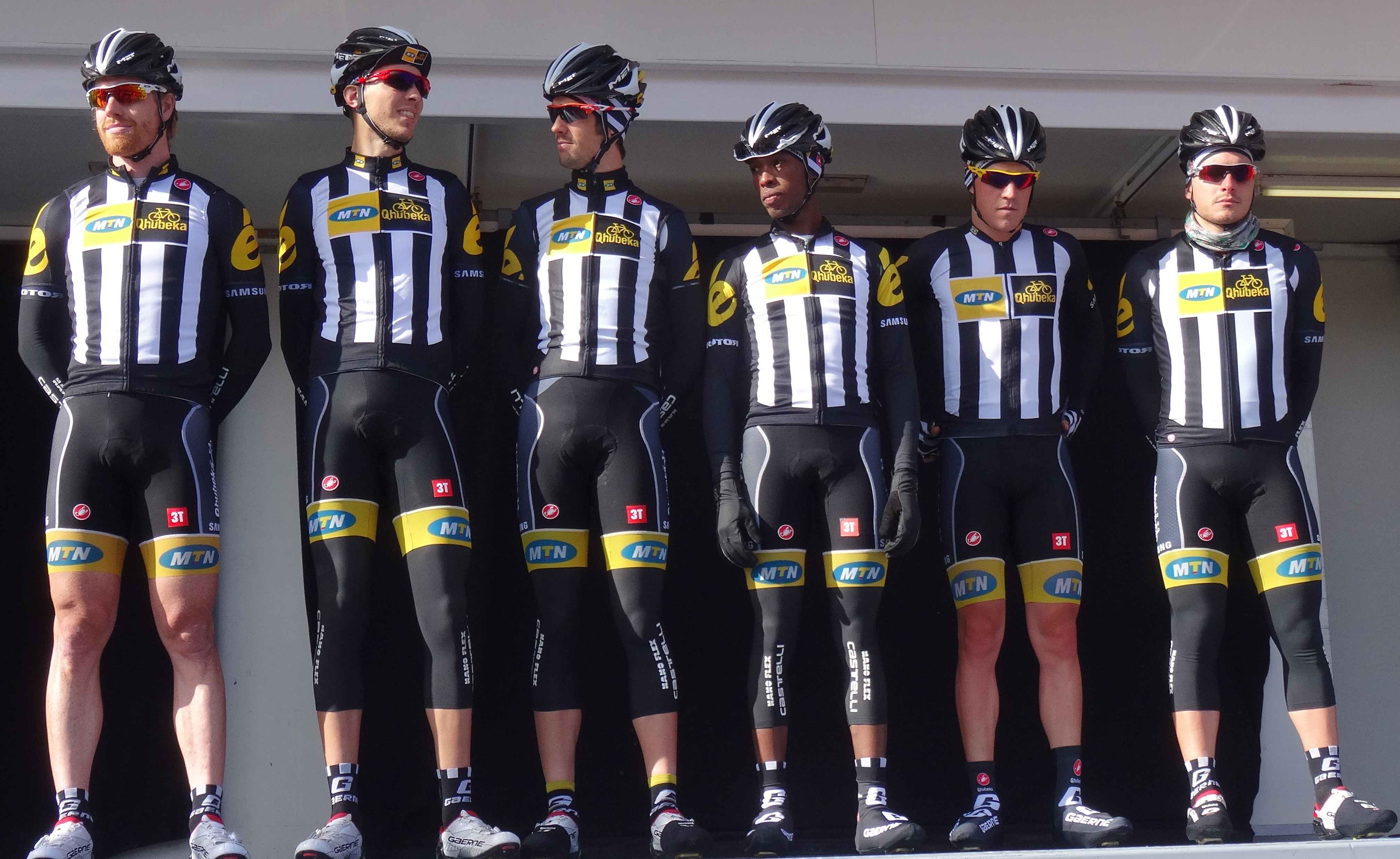 Reportage réalisé le mercredi 4 mars à l'occasion du départ du Samyn des Dames 2015 et du Samyn 2015 à Quaregnon, Belgique.